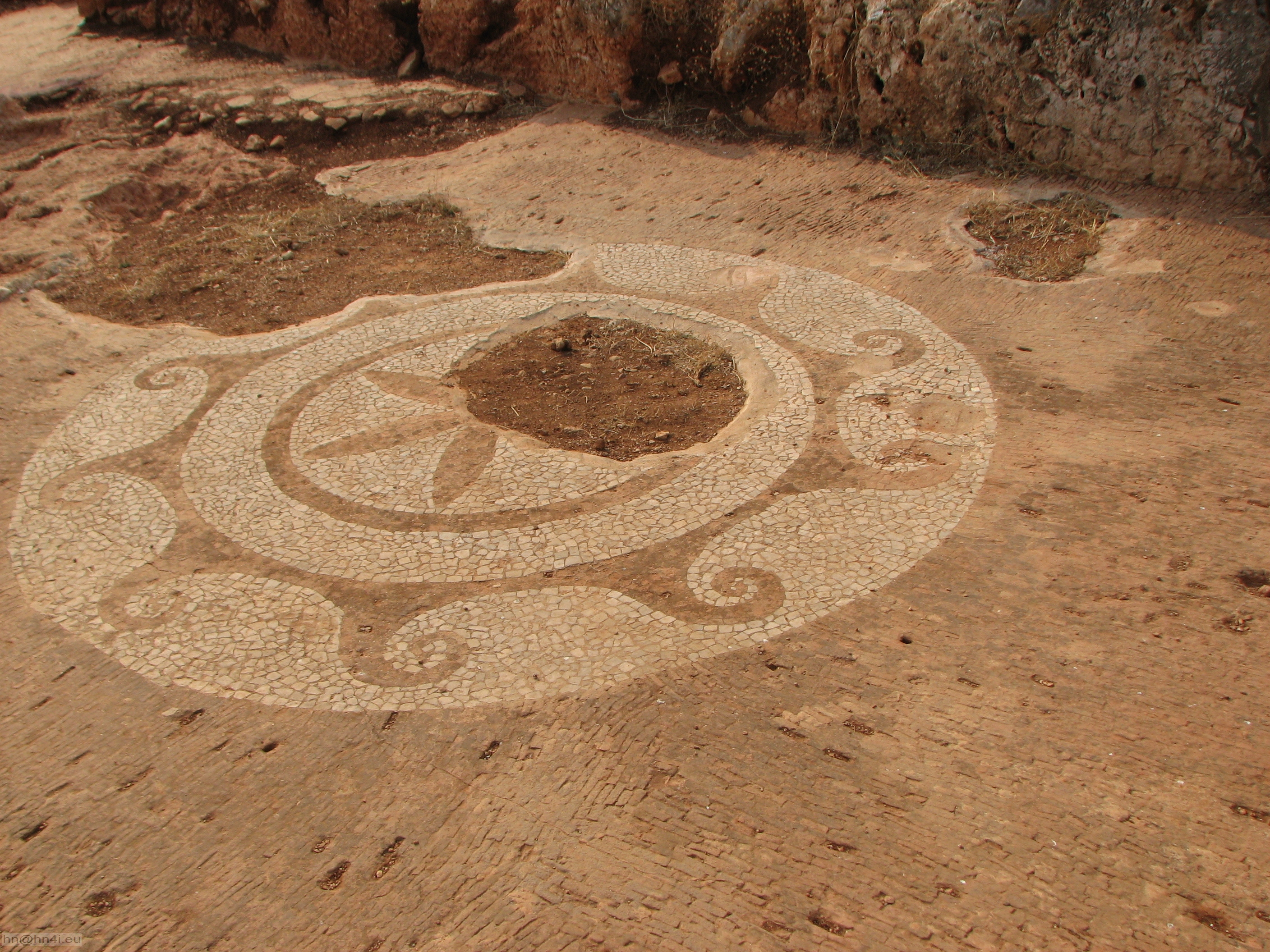 Φάρος Ακρωτηρίου Ταίναρον«Φάρος Ακρωτηρίου Ταίναρον»